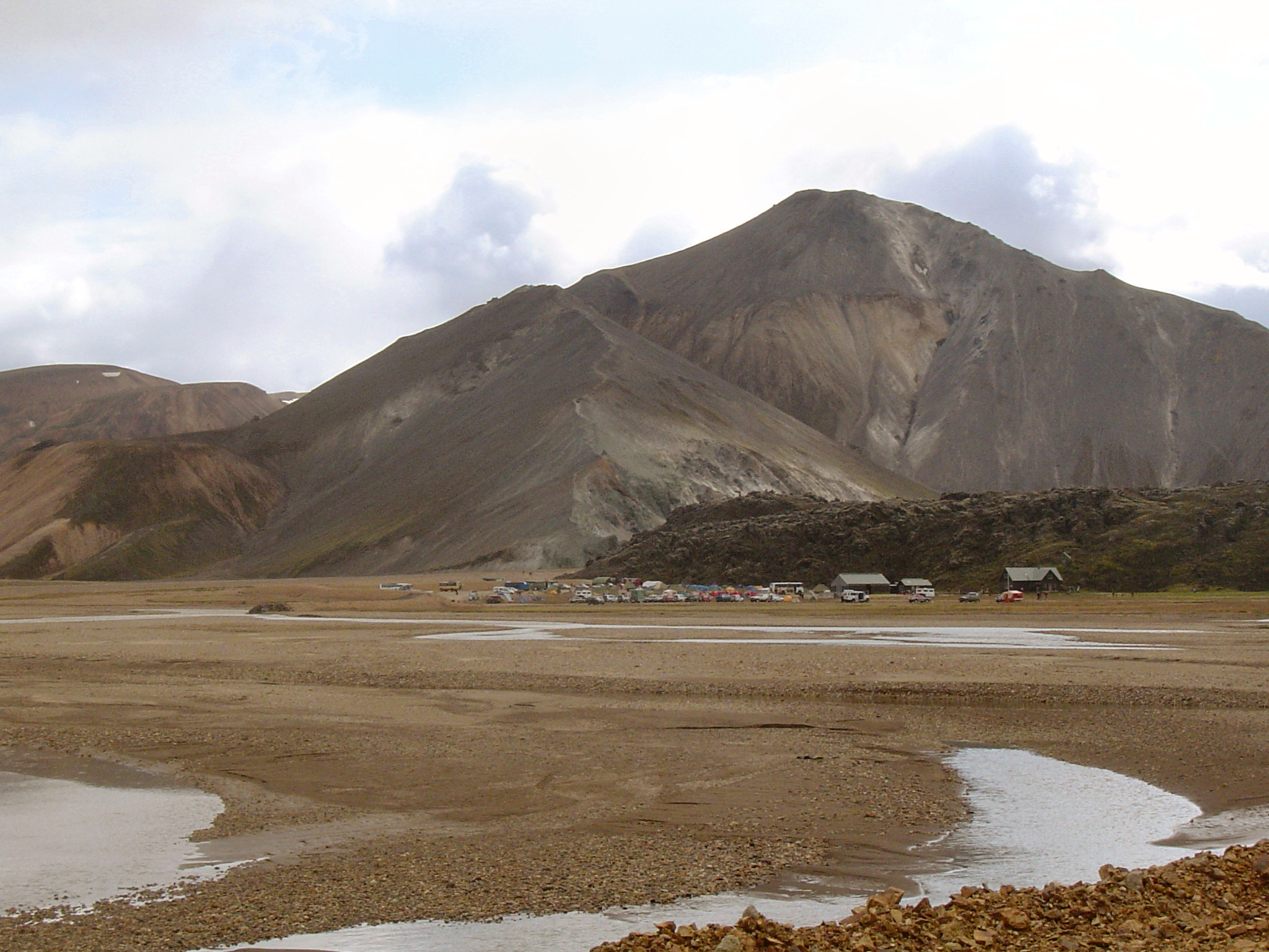 Bláhnjúkur vulcano in Landmannalaugar, Iceland